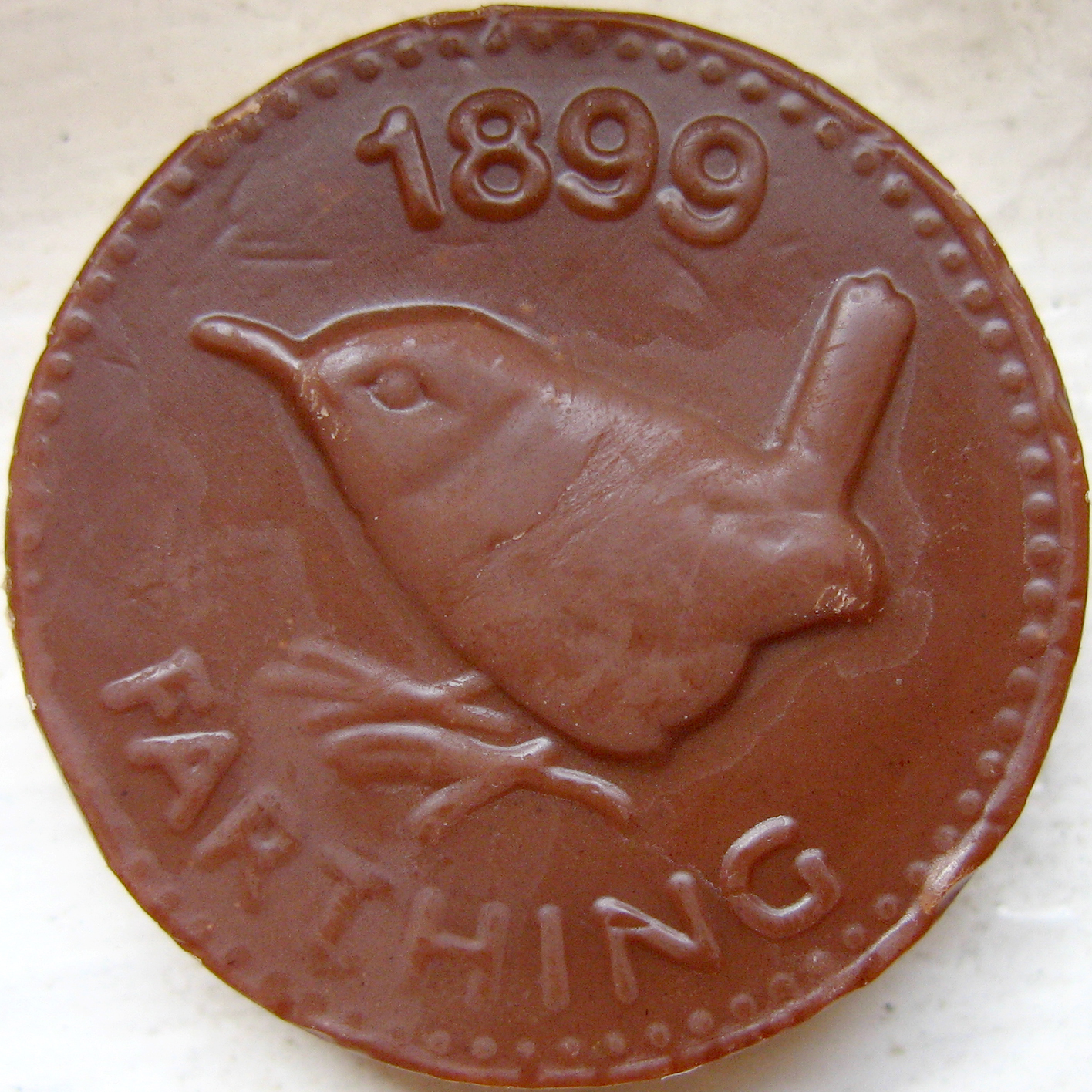 Chokladpeng, öppnad.